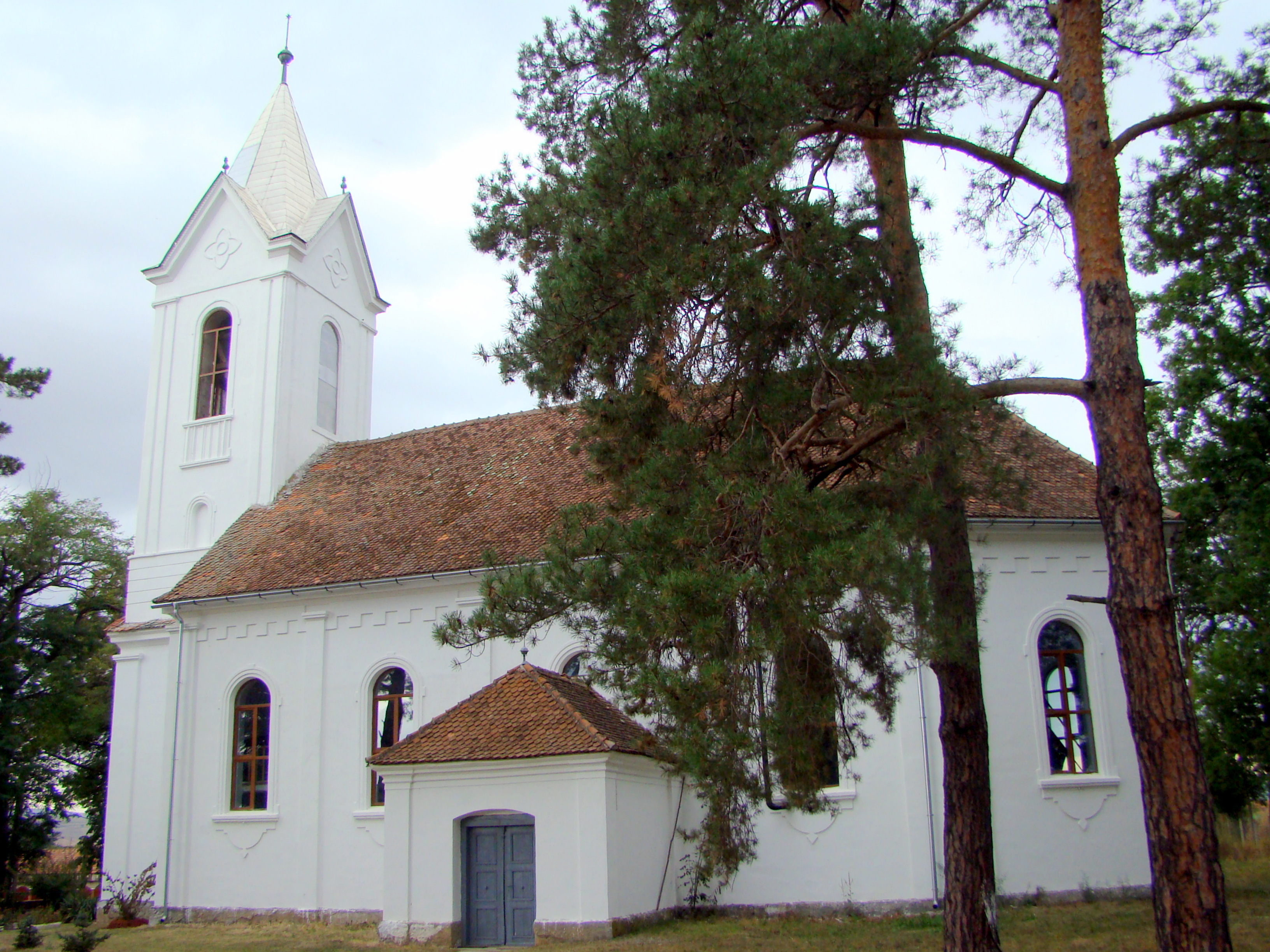 Biserica reformată, sat Mărcușa; comuna Catalina 2 sec. XVII